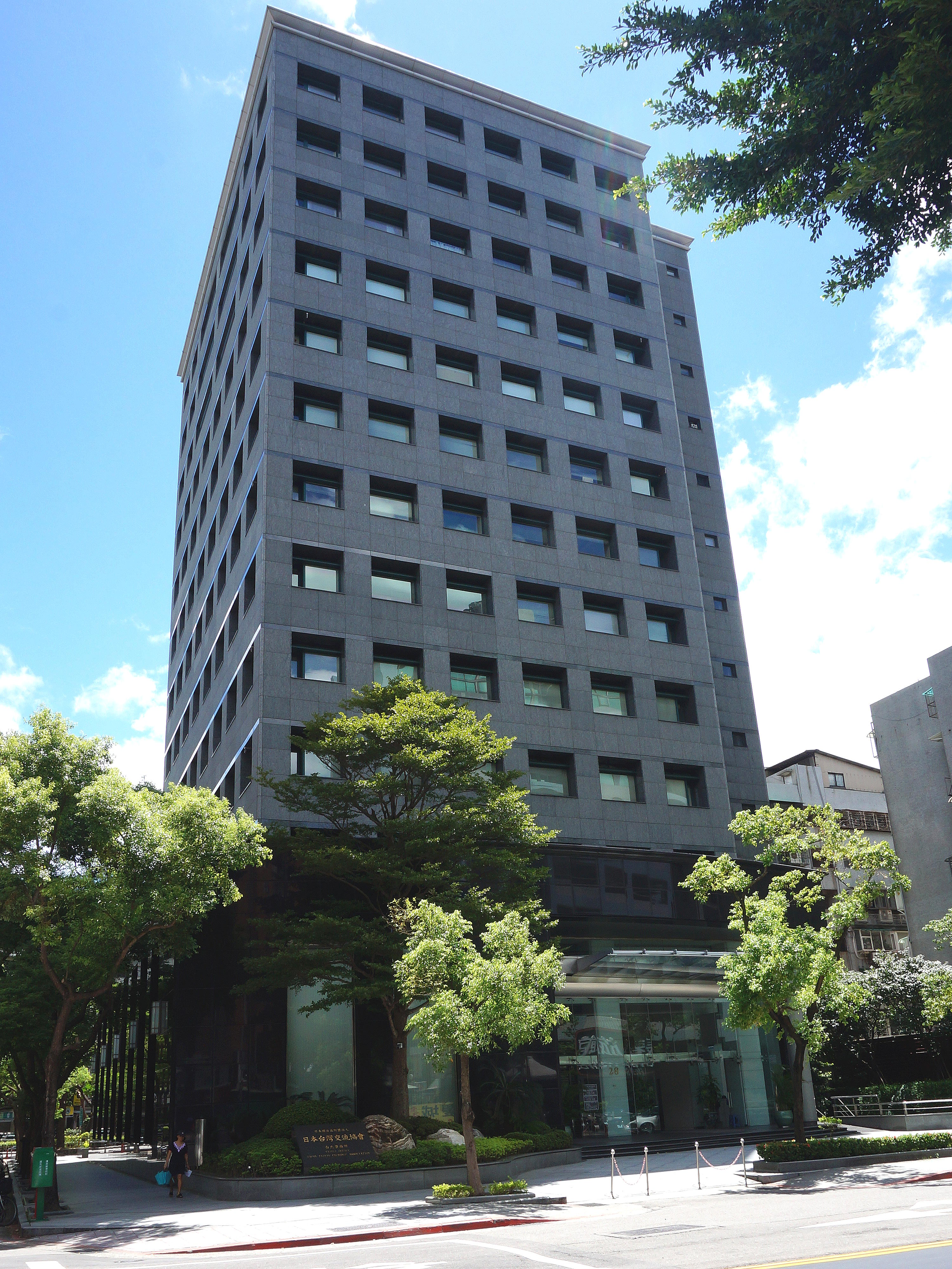 通泰商業大樓，地址：臺北市松山區慶城街28號。